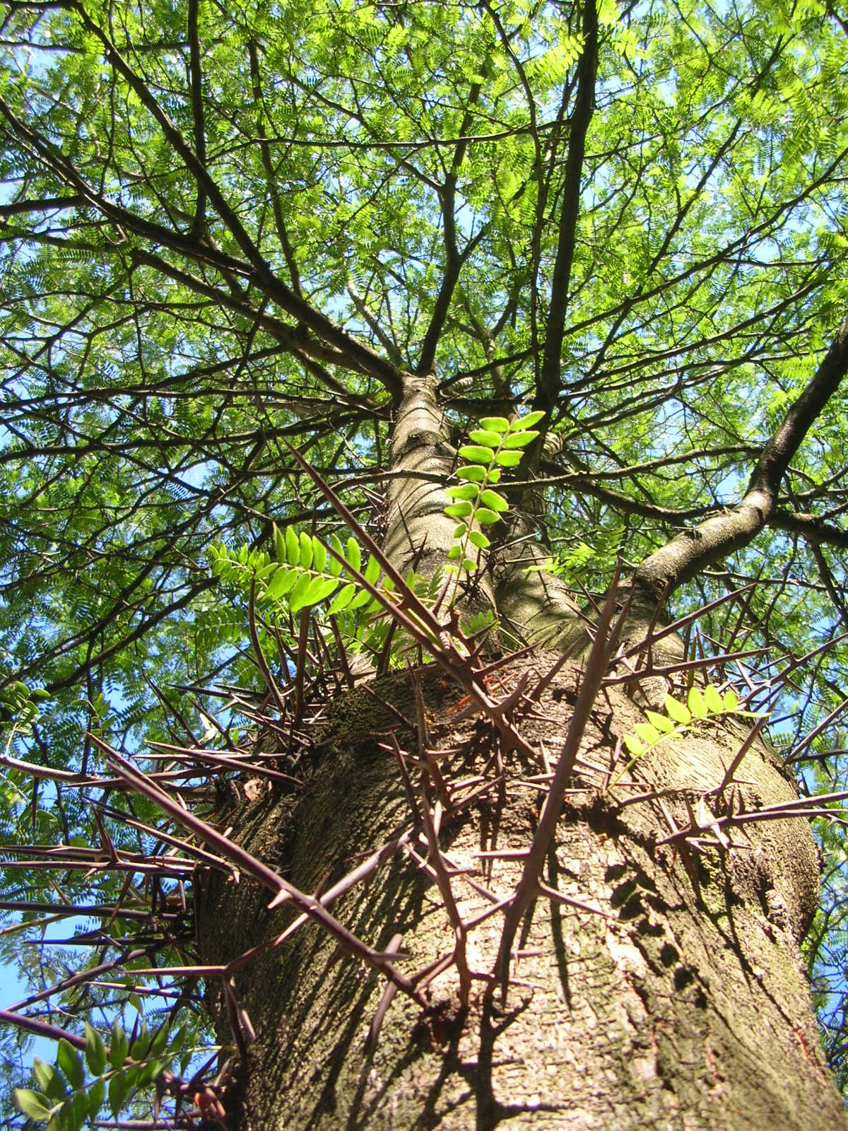 kolce na pniu